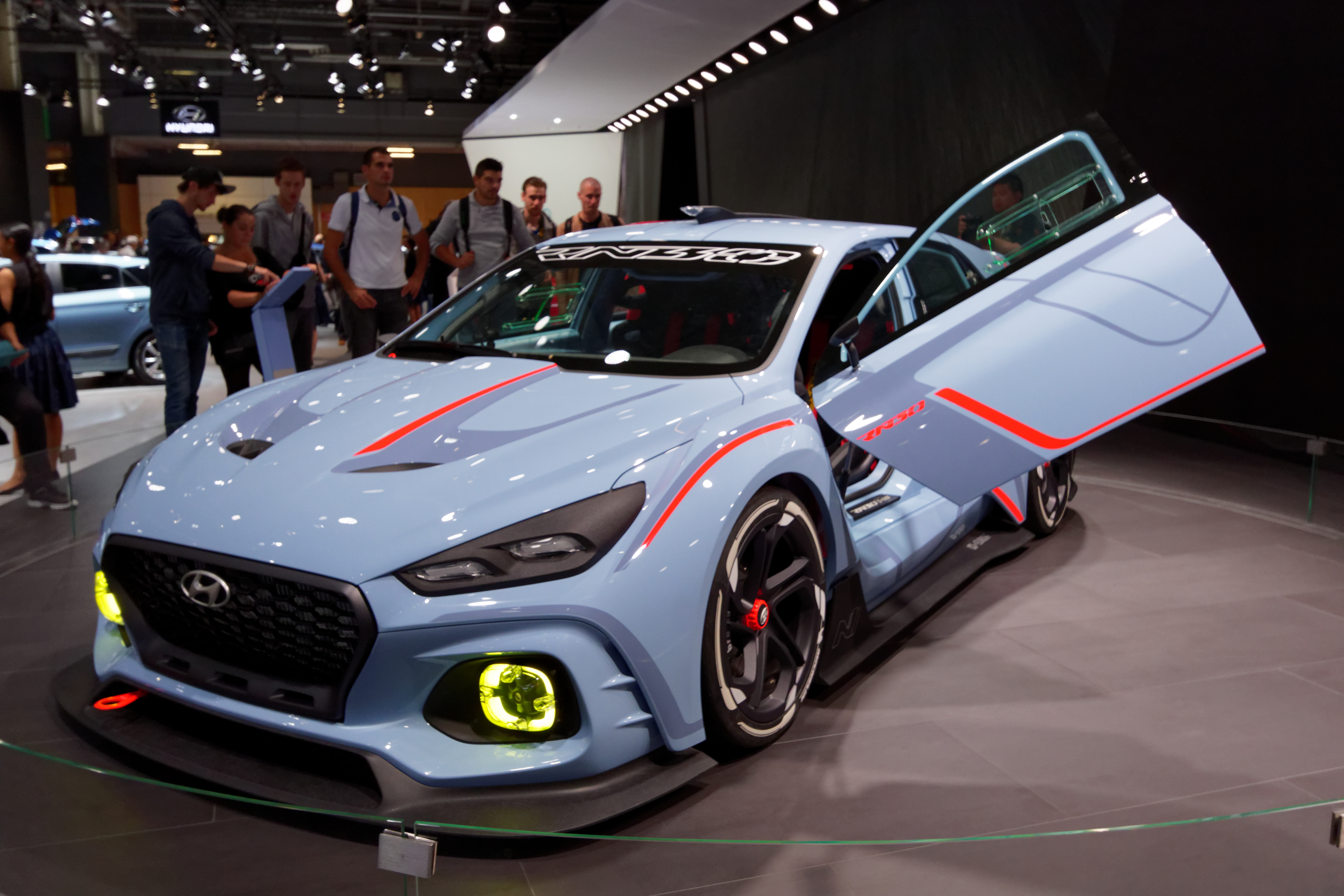 Une Hyundai RN30 Concept présentée lors du mondial de l'automobile de Paris 2016.